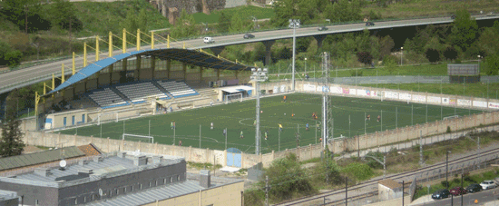 football